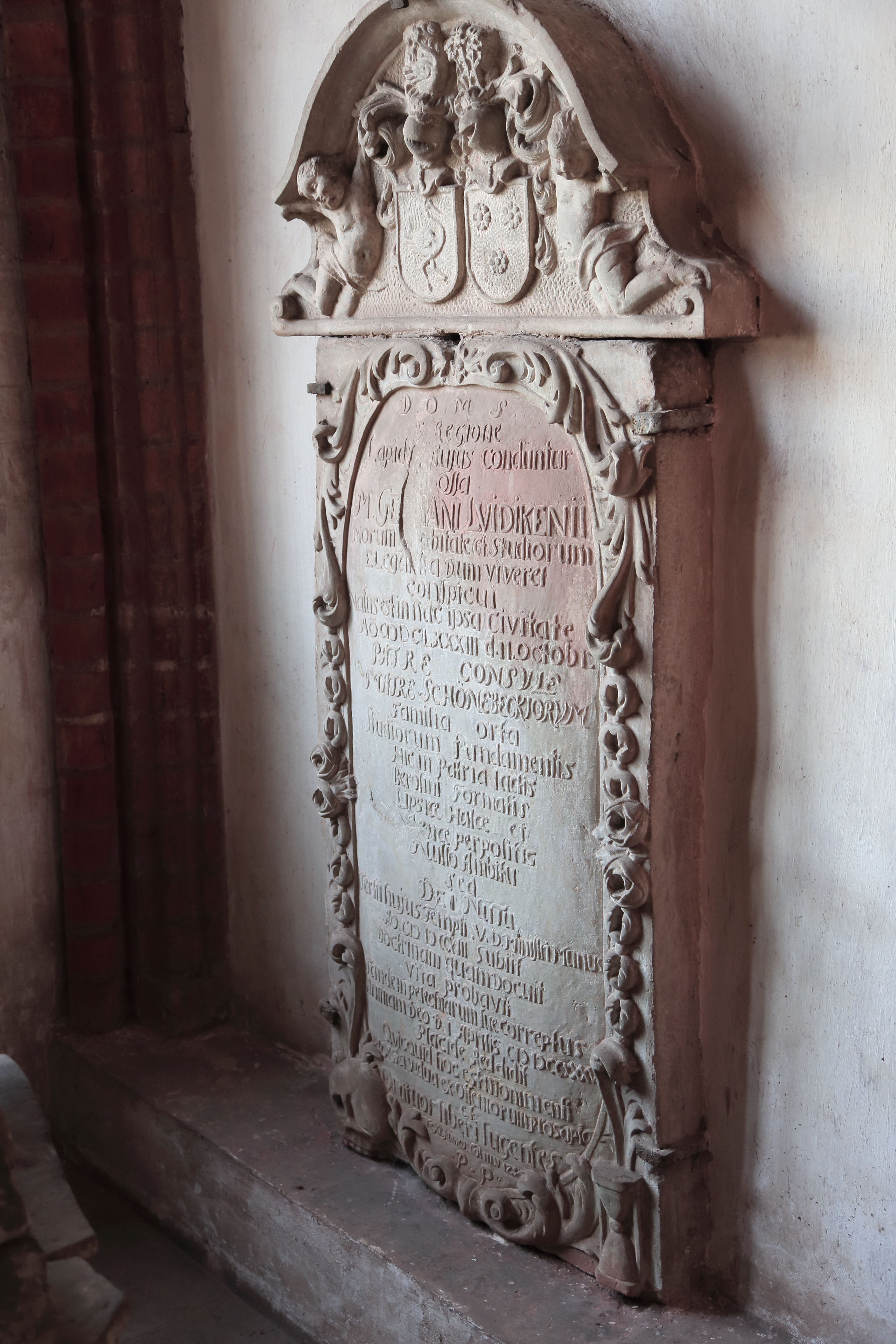 Das Grabmal von Germanus Lüdke im Dom zu Stendal, Altmark, Deutschland.